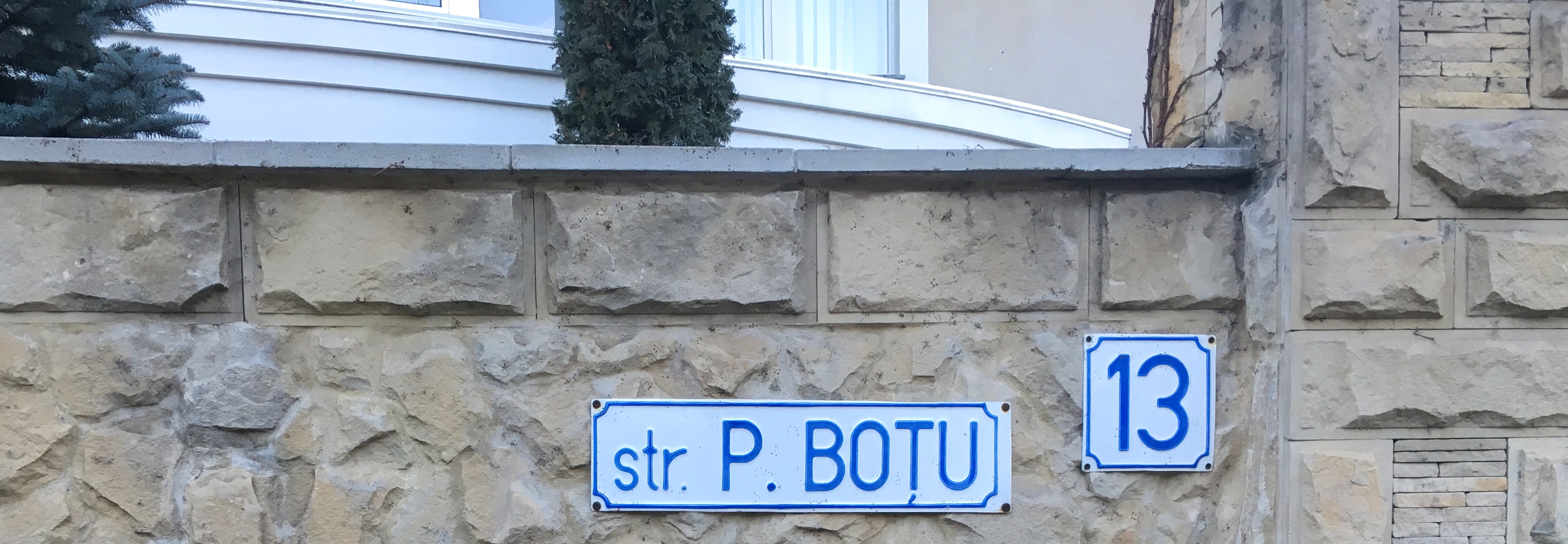 Strada Pavel Boțu la Chisinău